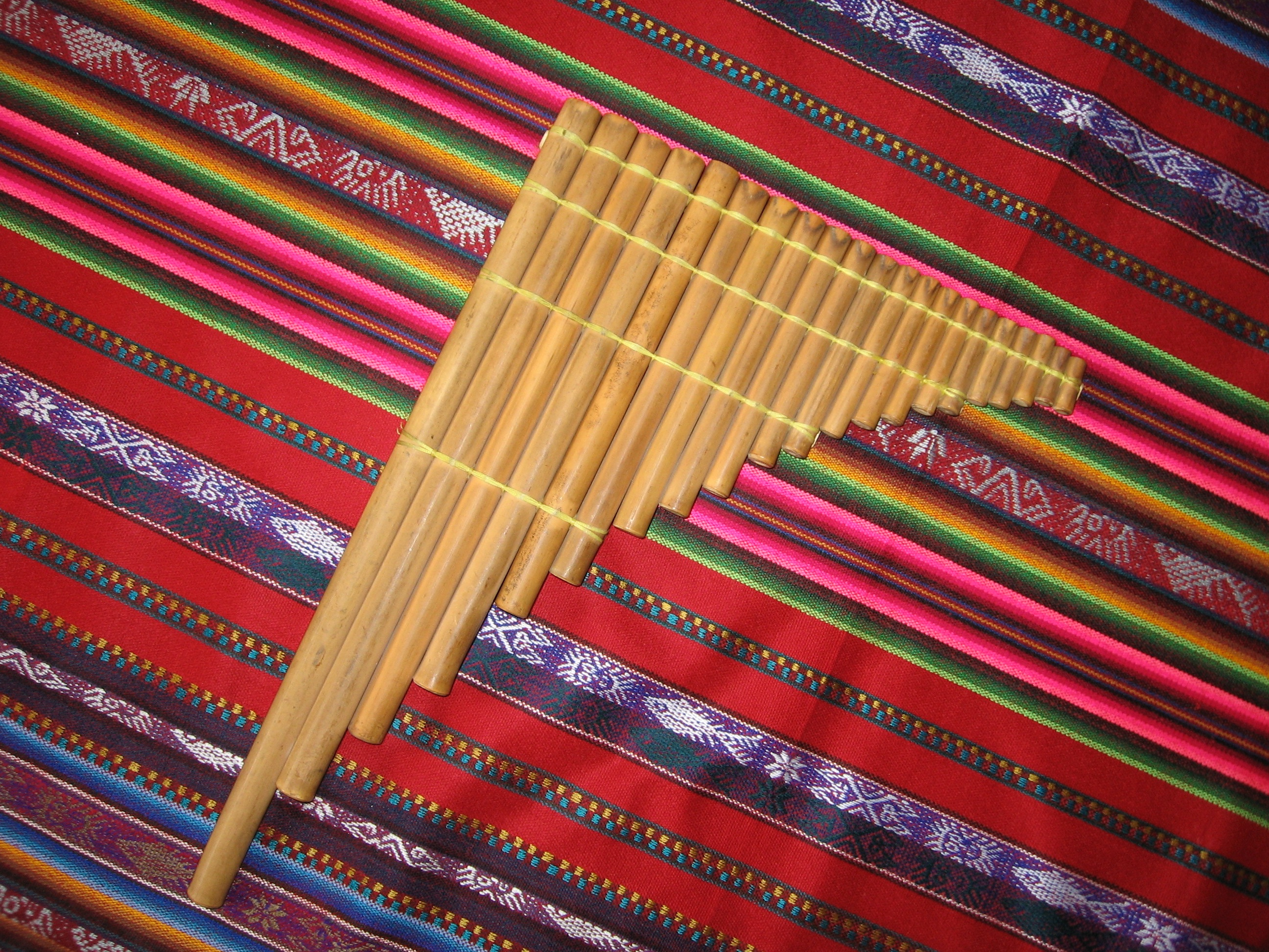 Flauta andina de tubo cerrado